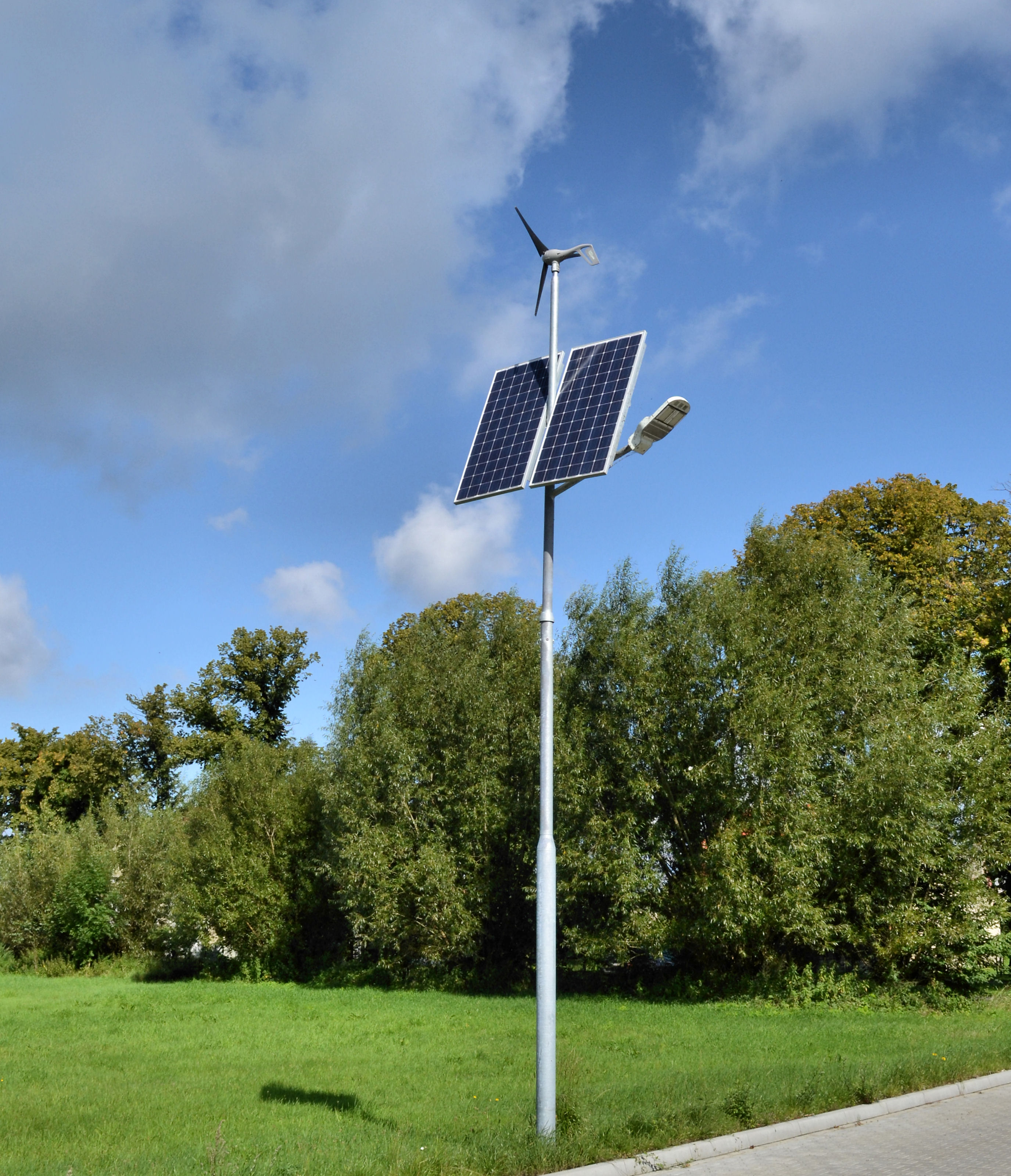 Nowoczesna latarnia uliczna w Nowym Warpnie z turbiną wiatrową, panelami słonecznymi i lampą LED jako źródłem światła.